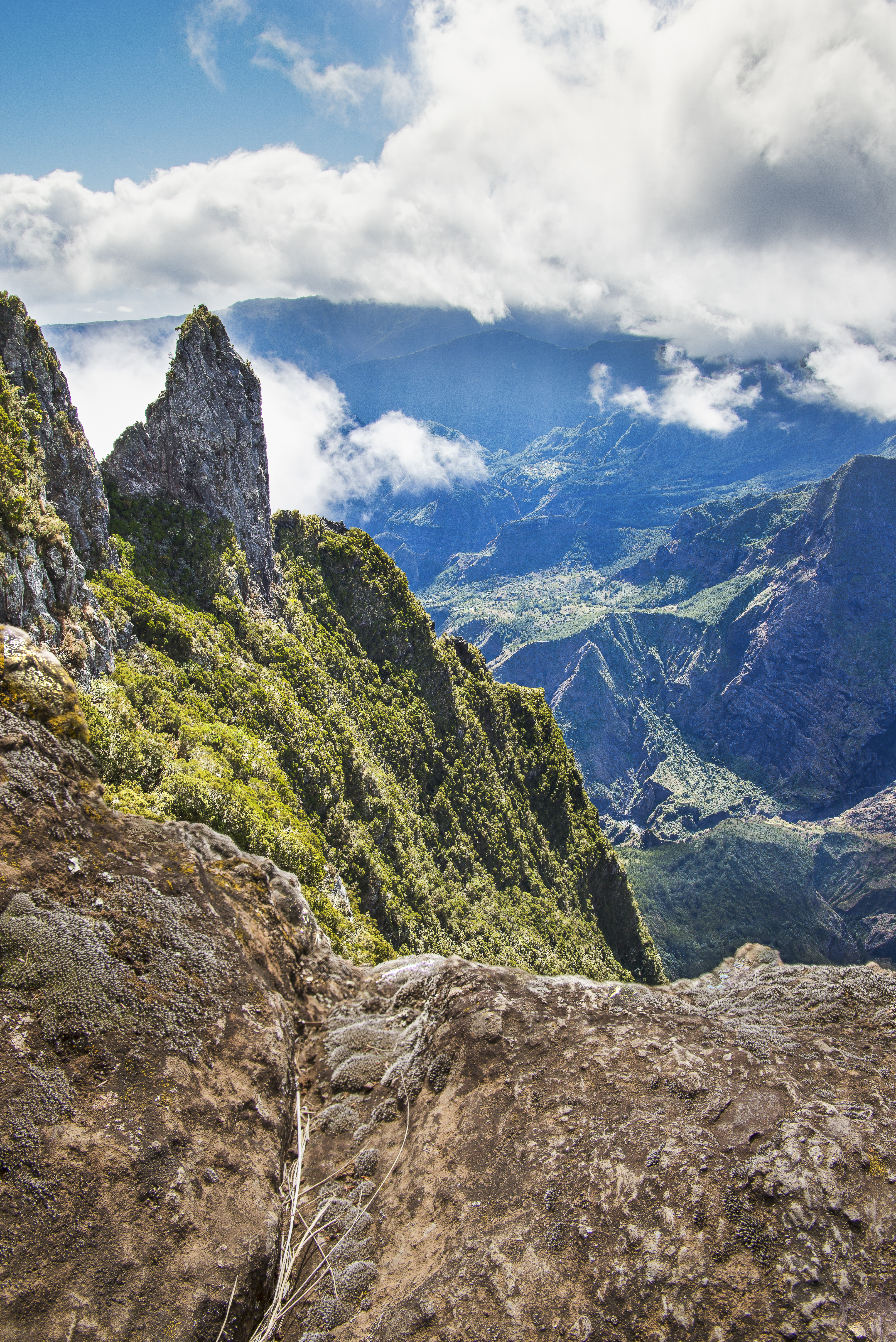 Site panoramique du Maïdo situé à plus de 2200 mètre d'altitude.